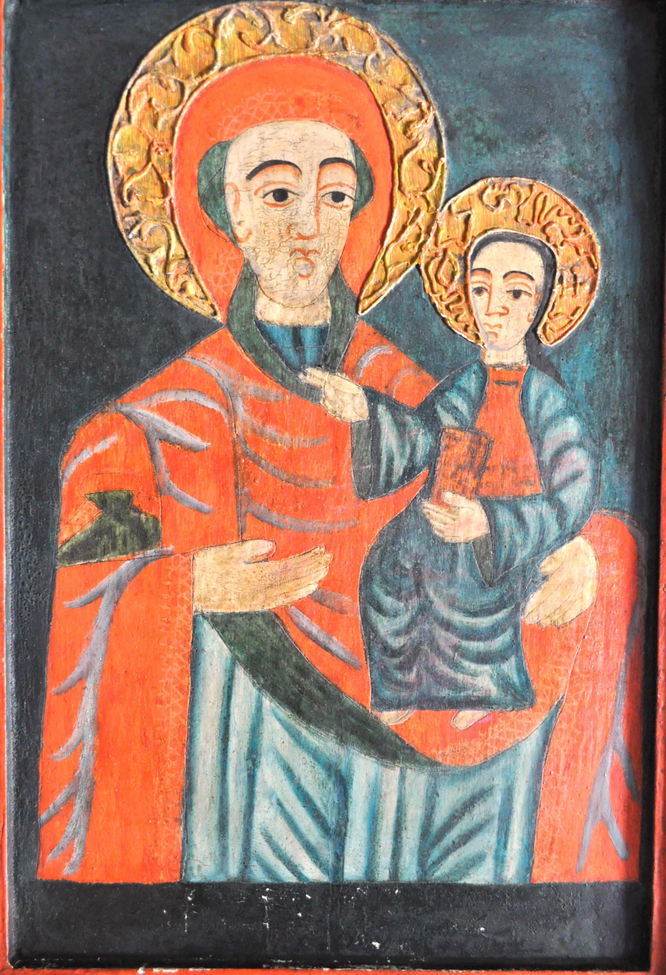 Biserica de lemn „Sf. Arhangheli Mihail şi Gavriil" din Tăuți, județul Cluj